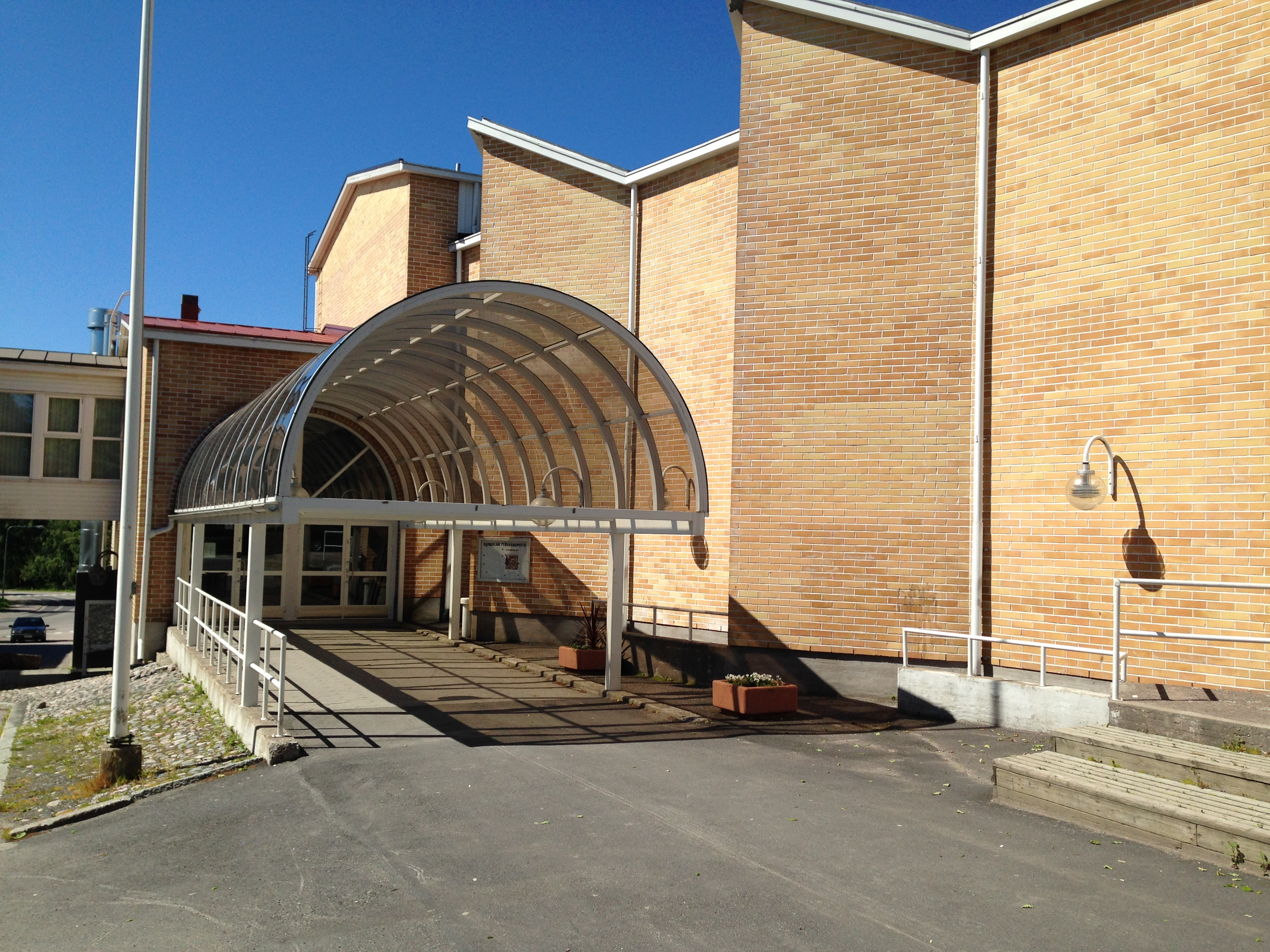 Karkkilan lukion sisäänkäynti kesäkuussa 2015